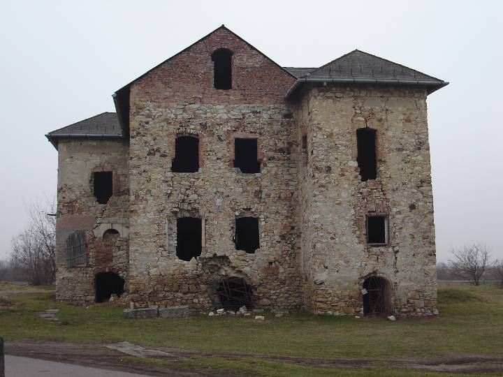 Báró Vay Miklós kastélya Golopon (Borsod-Abaúj-Zemplén)